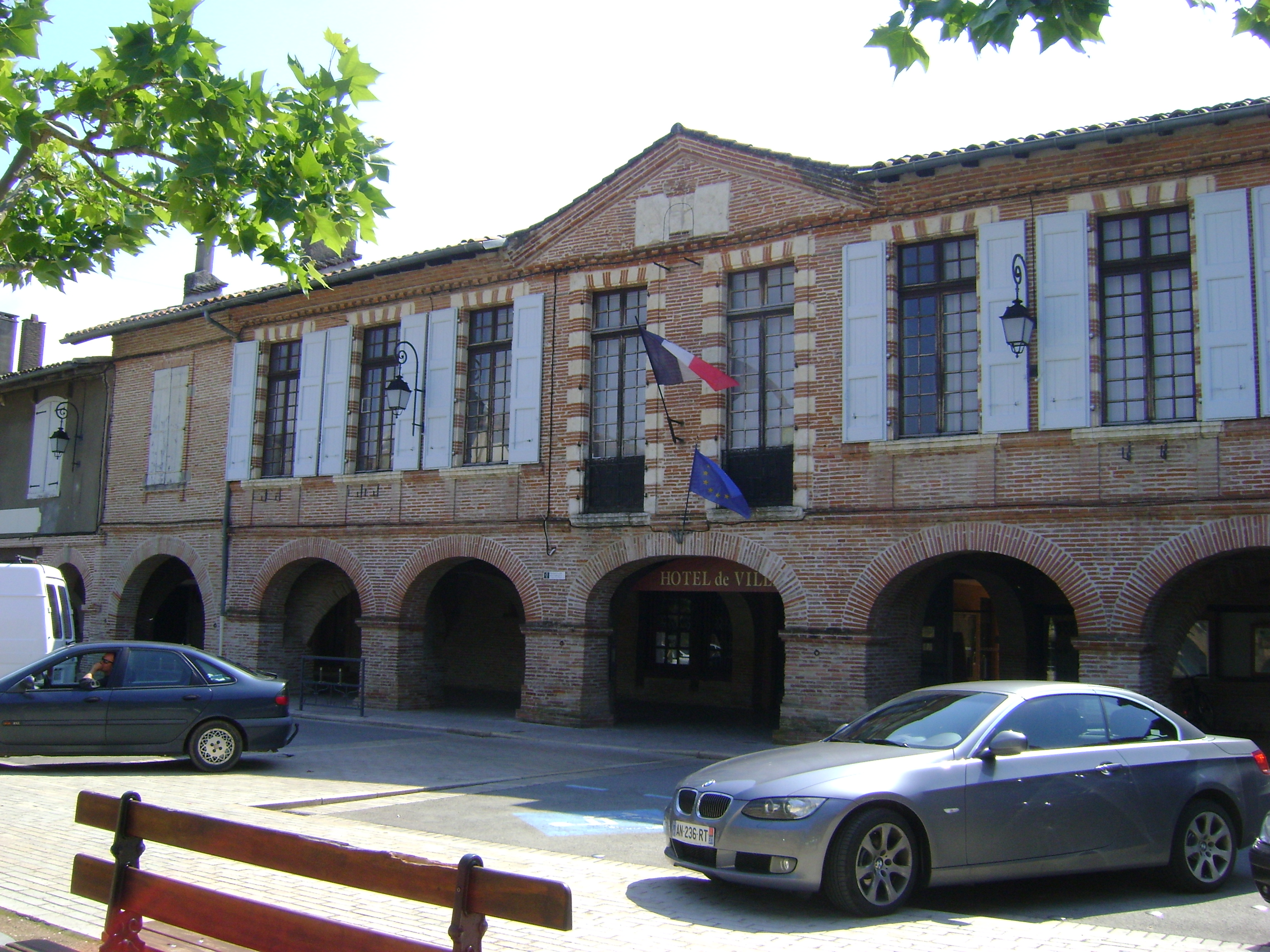 Ancien hôtel de Boisset-Glassac, Hôtel de ville de Lisle-sur-Tarn, Tarn